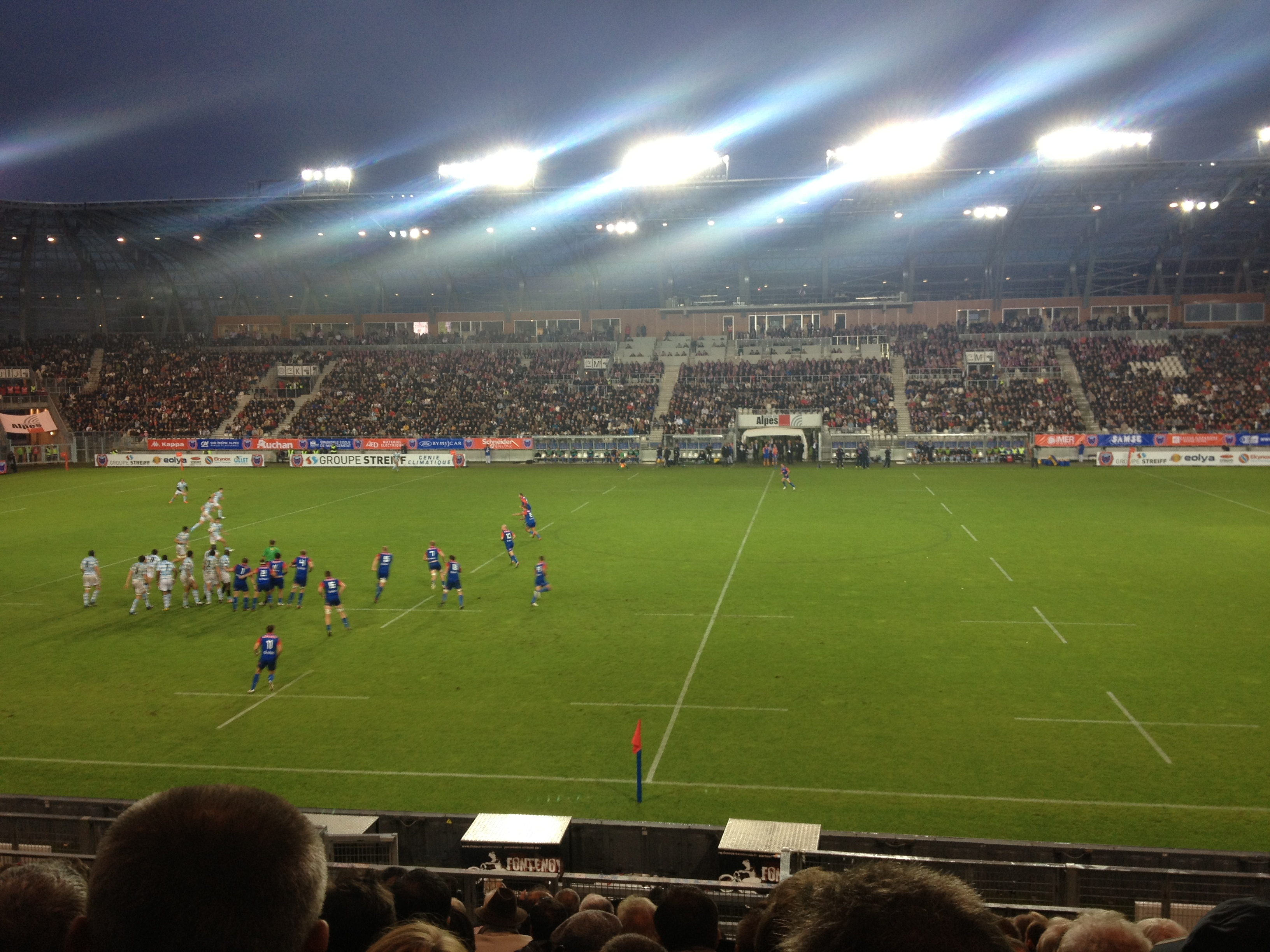 Stade des Alpes où joue désormais le FC Grenoble